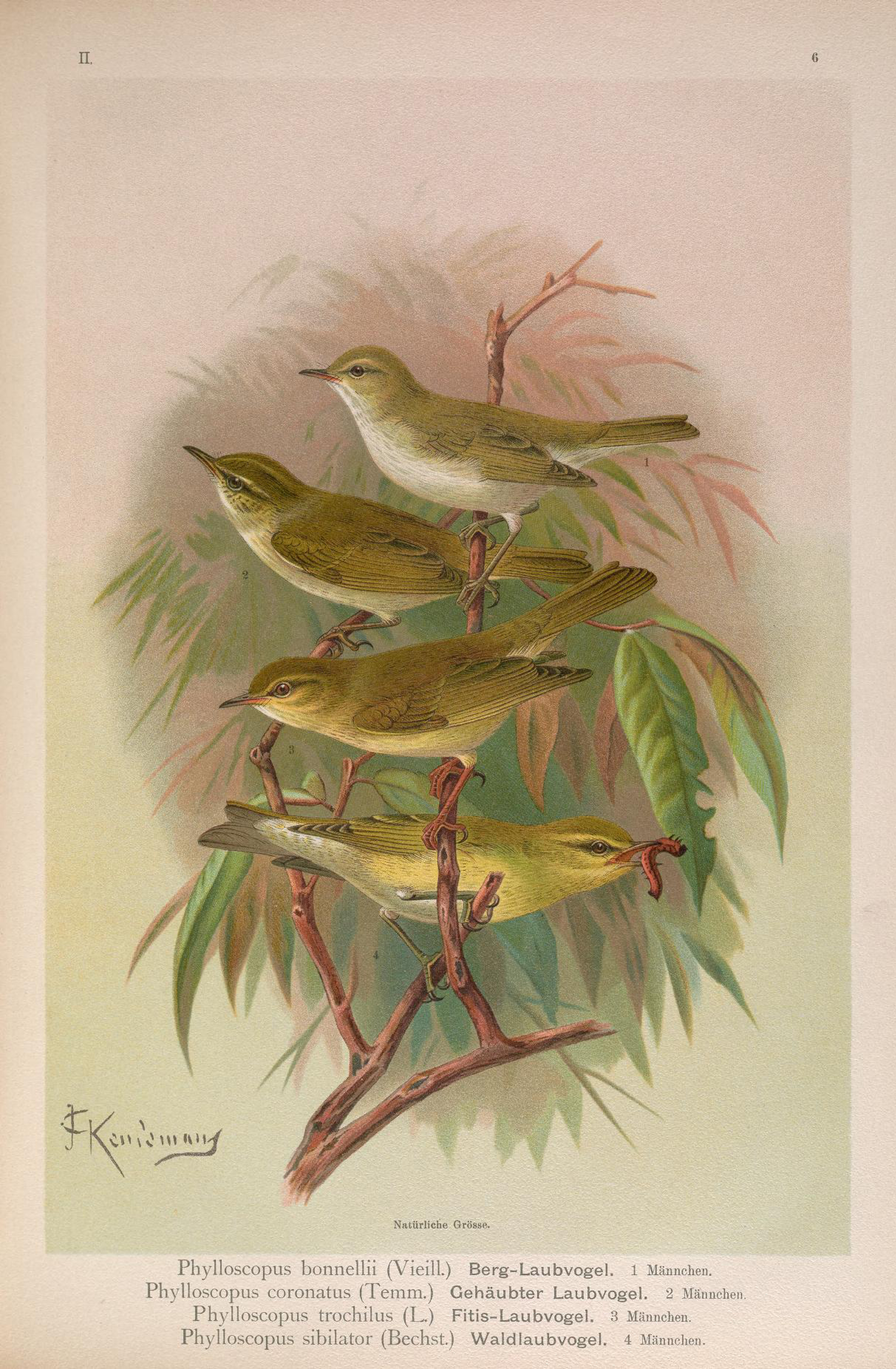 Phylloscopus bonelli (Vieill.) - Berglaubsänger Phylloscopus coronatus* - Gehäubter Laubsänger Phylloscopus trochilus - Fitis Phylloscopus sibilatrix - Waldlaubsänger